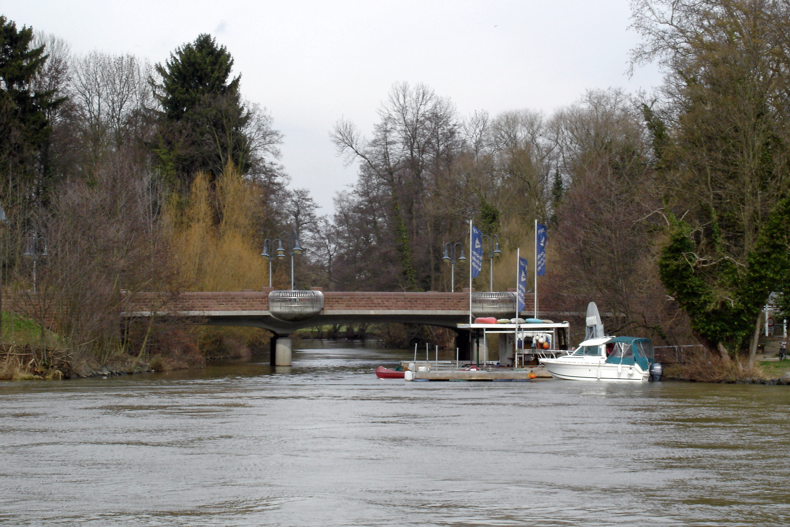 Kinzigmuendung in Hanau